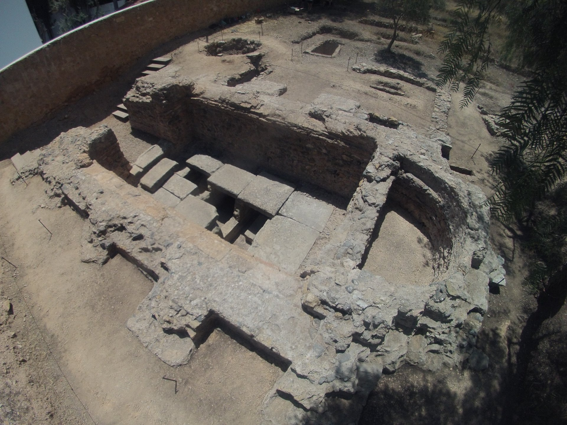 Ruinas romanas de La Alberca ("Martyrium")